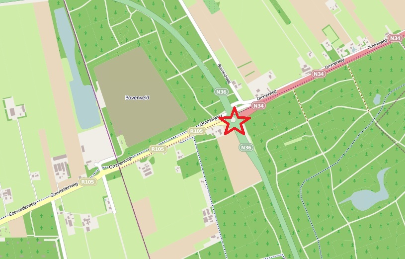 Witte Paal op een kaart van Open StreetMap.